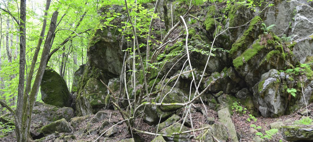 Vemannsås har et variert landskap hvor naturen får ordne seg selv. Her blokkmark og varmekjære lindetrær.